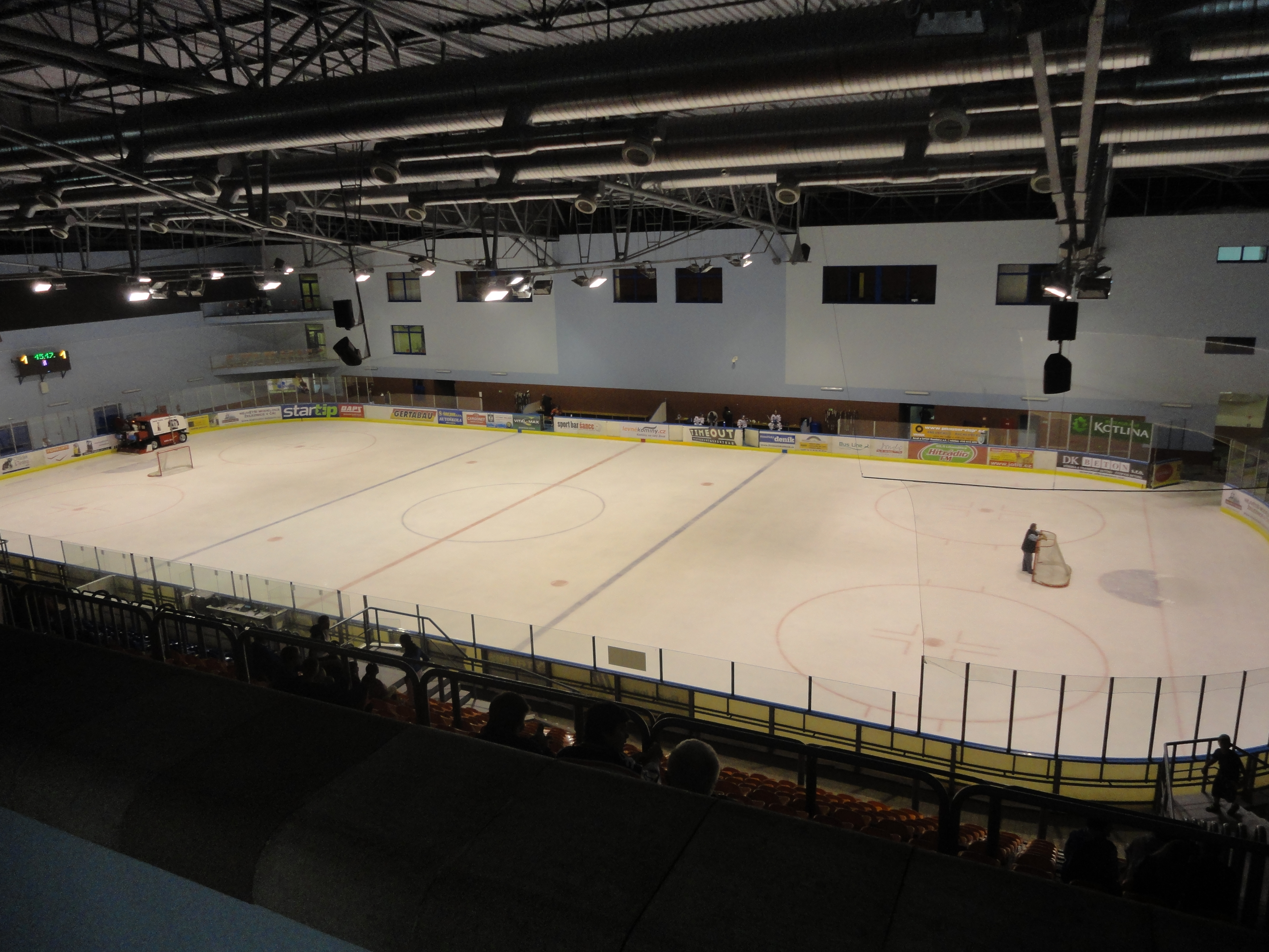 Kalich Aréna v Litoměřicích, pohled na ledovou plochu